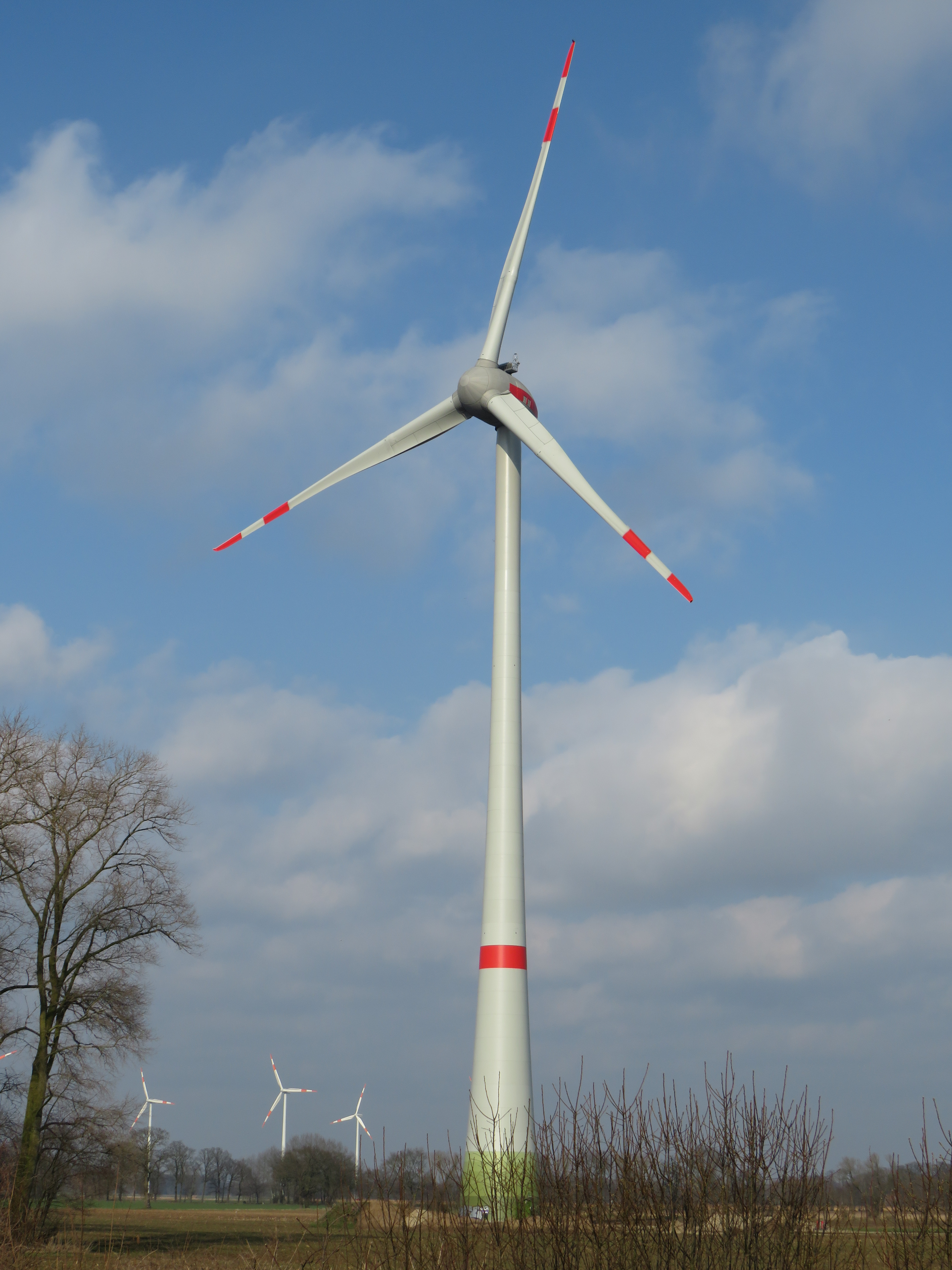 Windkraftanlage des Typs ENERCON E-126 EP4 mit 4,2 MW Nennleistung in Holdorf (Landkreis Vechta, Niedersachsen). Die Anlage entstand Ende 2016 und ersetzt eine ältere Anlage des Typs ENERCON E-58. BIld aufgenommen vom Rastplatz Langwege an der Bundesautobahn 1